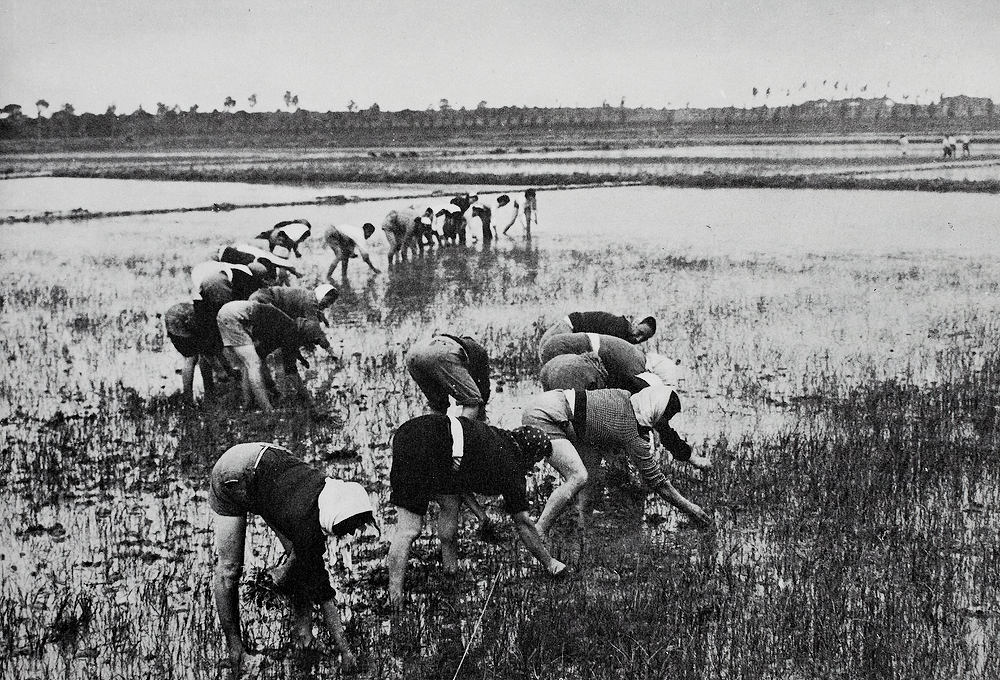 Mondine